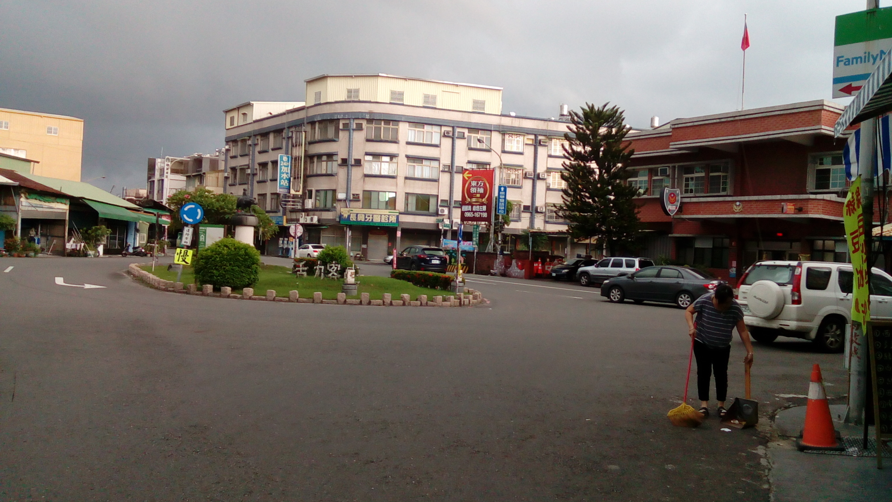 長治市區